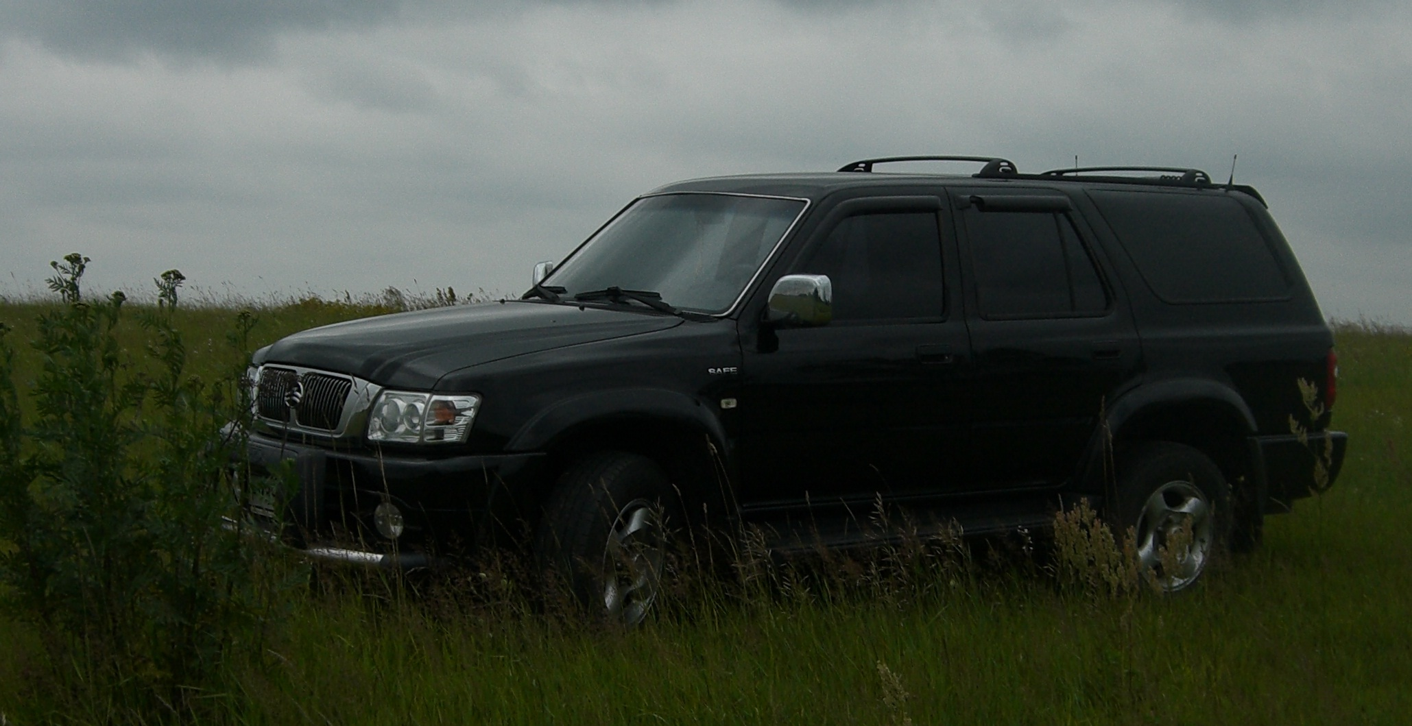 Great Wall Safe В поле